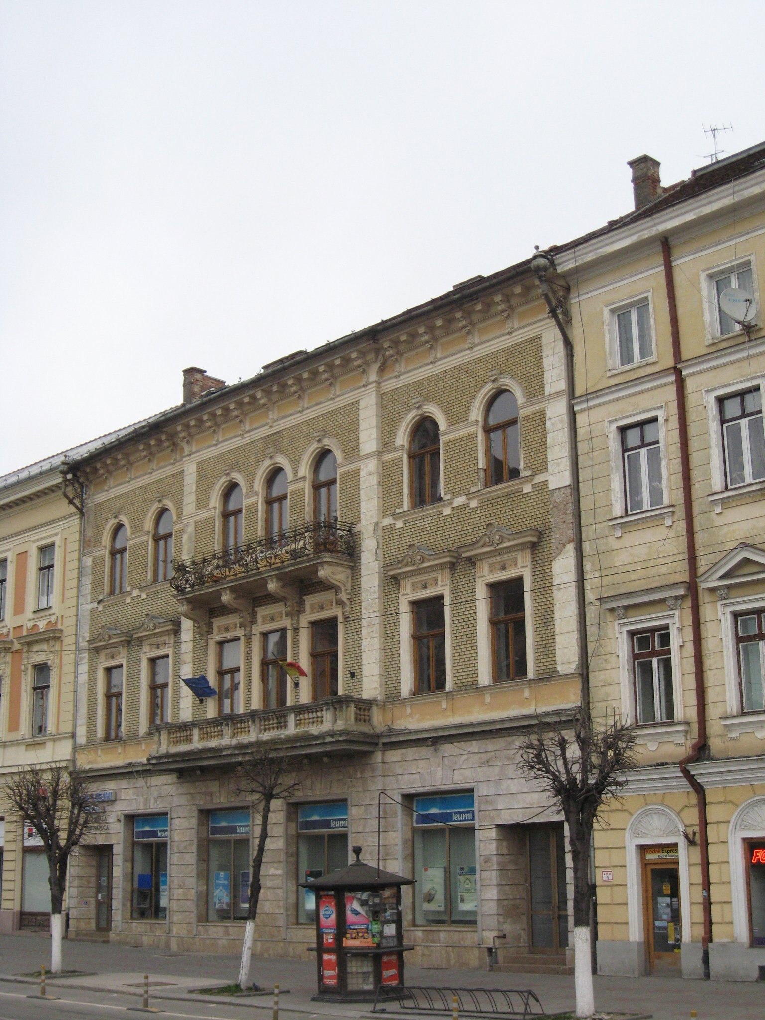 Cluj-Napoca, Casa Wolphard-Kakas (Piaţa Unirii nr.31)